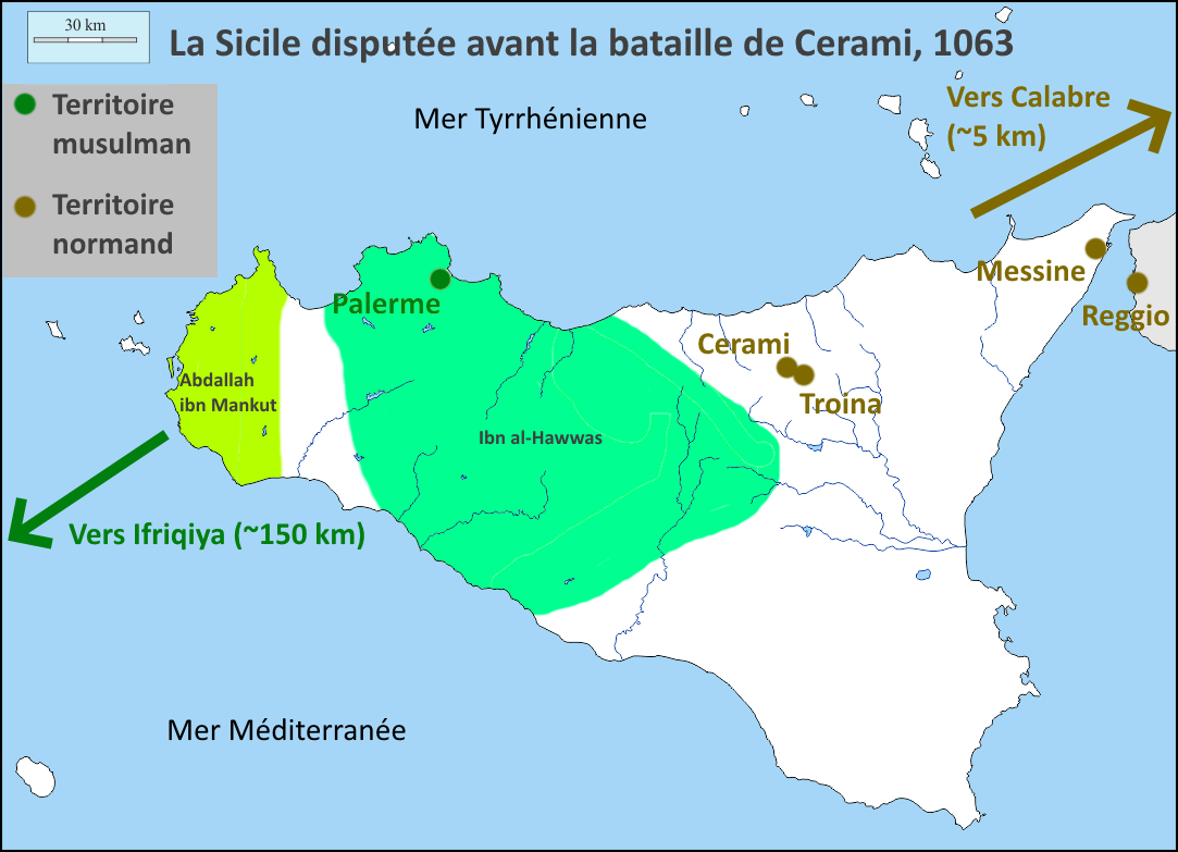 Carte politique de la Sicile en 1063. Les points vers représentent les villes tenues par les musulmans, les points jaunes représentent les villes tenues par les normands, et les flèches désignent les territoires proches tenus par les camps respectifs, avec les mêmes codes couleurs. Les territoire en vert clair est celui de Ibn al-Hawwas, tandis que celui qui est en vert-jaune représente celui de Abdallah ibn Mankut. Cela représente l'état de l'île avant la bataille de Cerami de 1063, qui marque l'affirmation de la domination normande sur le territoire.